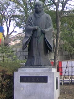 五条坂の大谷本廟にある親鸞聖人像